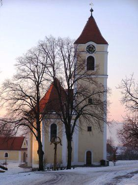 Kostel sv. Filipa a Jakuba